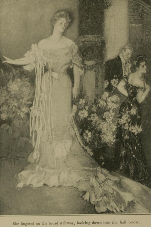 Illustration